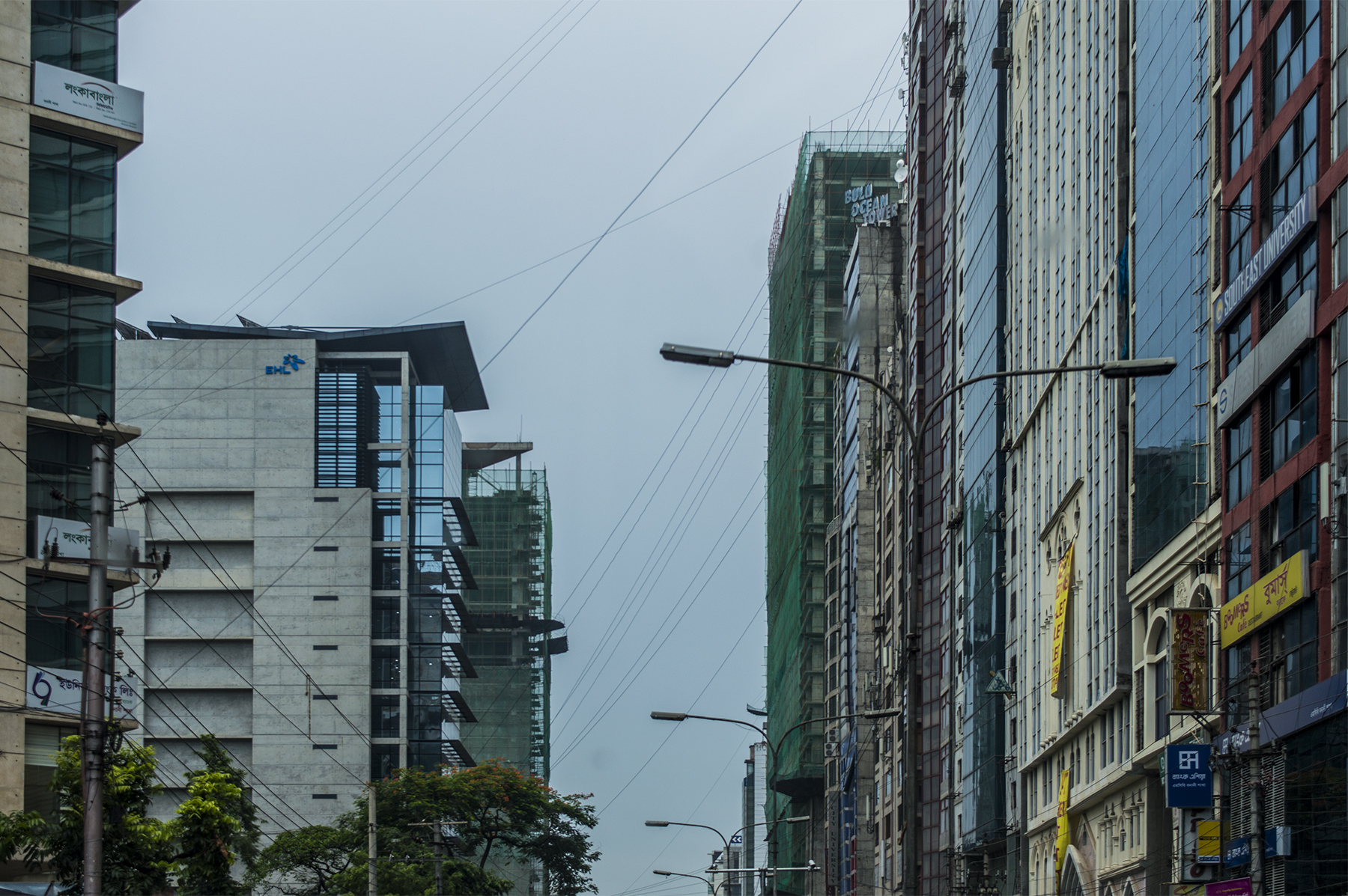 Dhaka